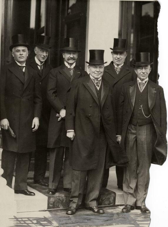 Tweede kabinet Colijn (1933-1935). V.l.n.r: Oud, Marchant, Kalff, De Wilde, Van Schaik, Colijn. Den Haag, 26 mei 1933.